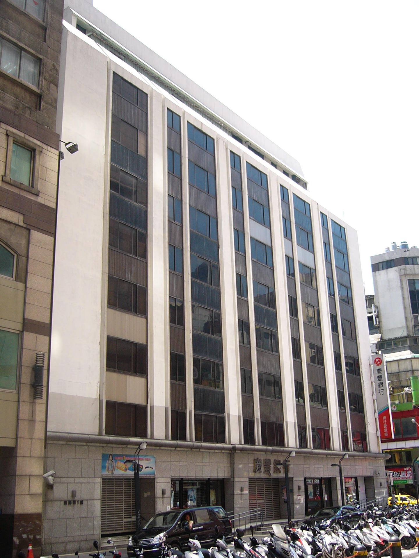 已結束營業的慶豐商業銀行總行。